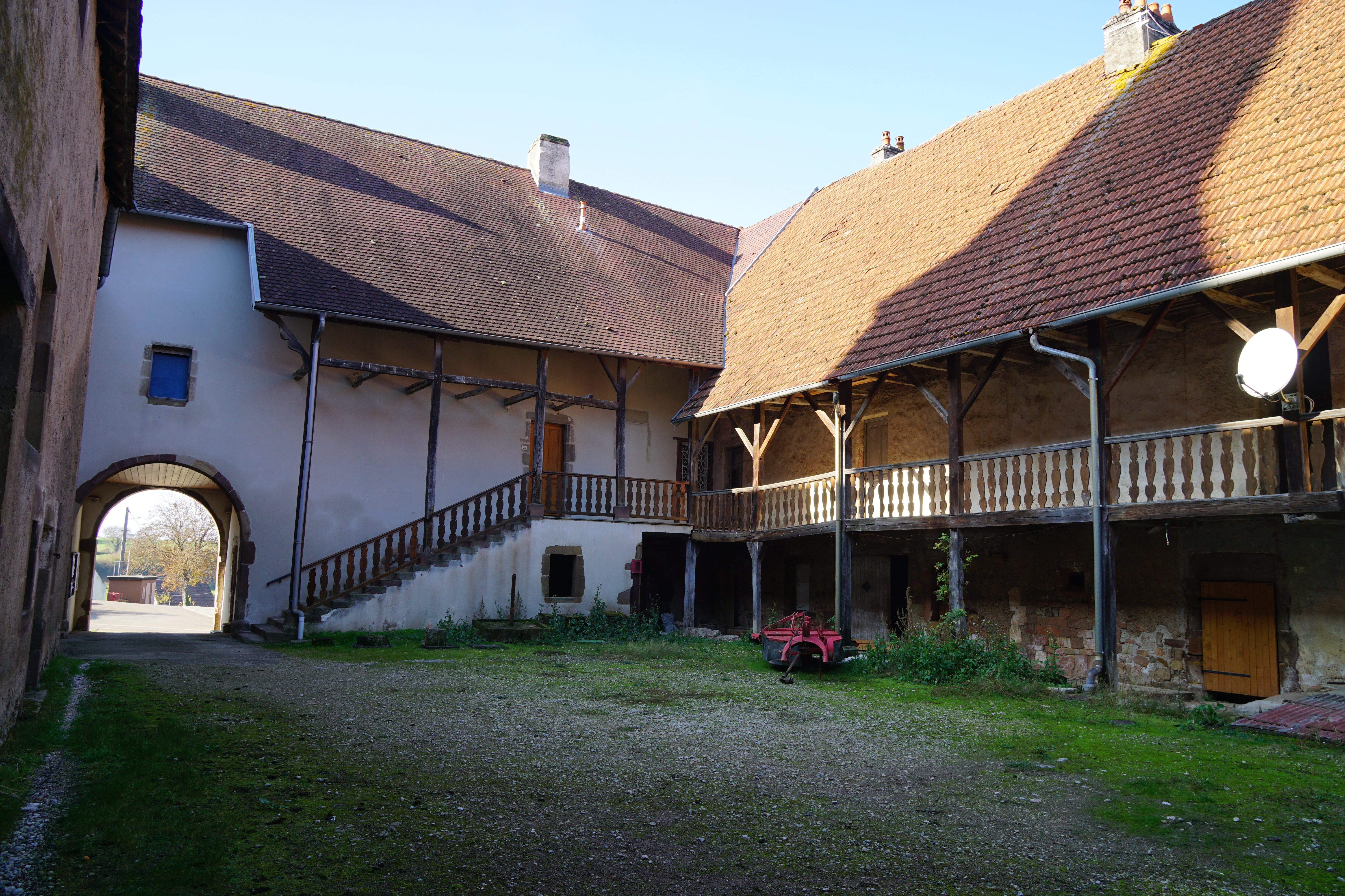 La ferme-mairie de La Villedieu-en-Fontenette.